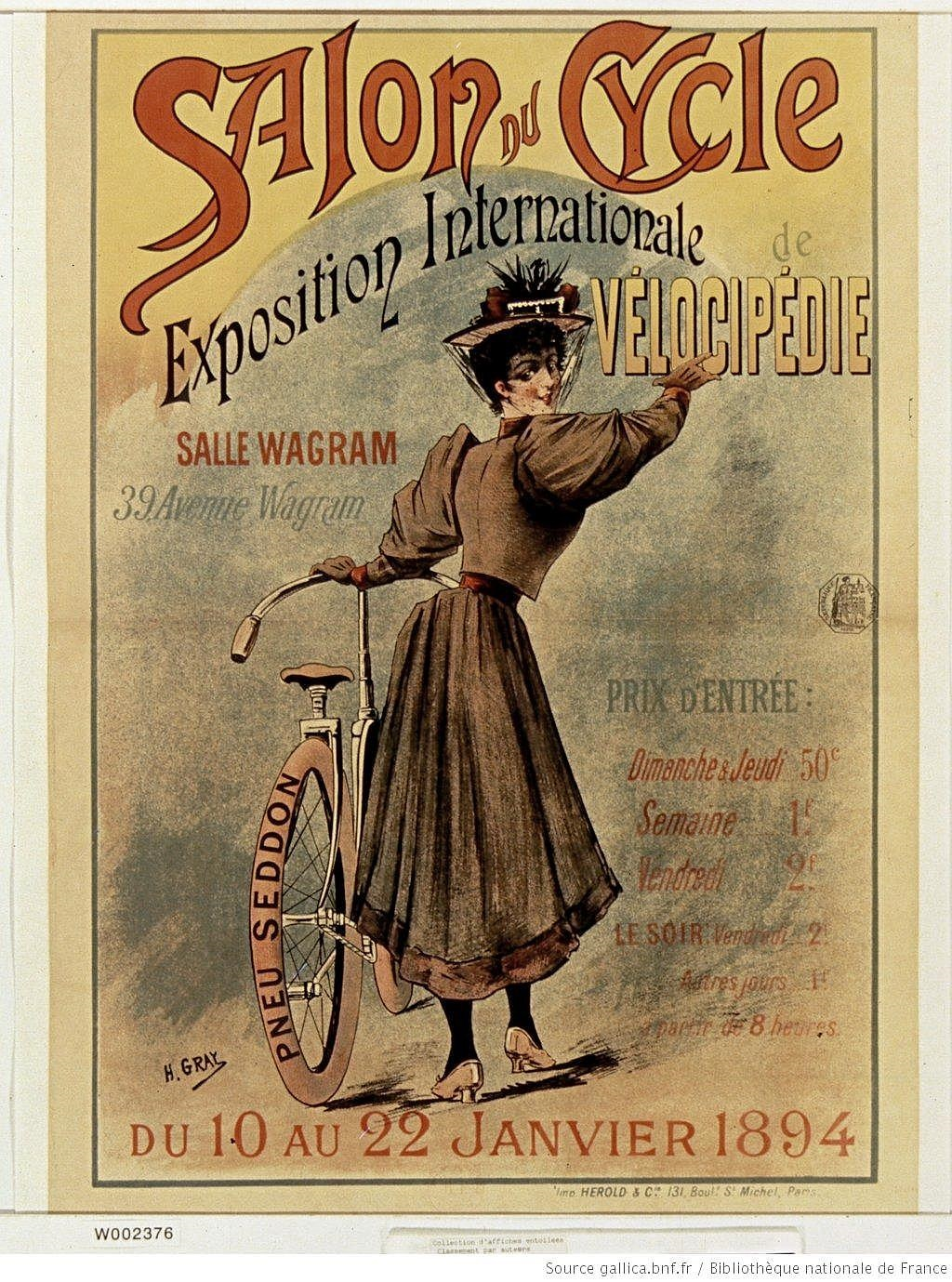 Salon du cycle : Exposition internationale de vélocipédie.(affiche) Gray, Henri (1858-1924). Illustrateur